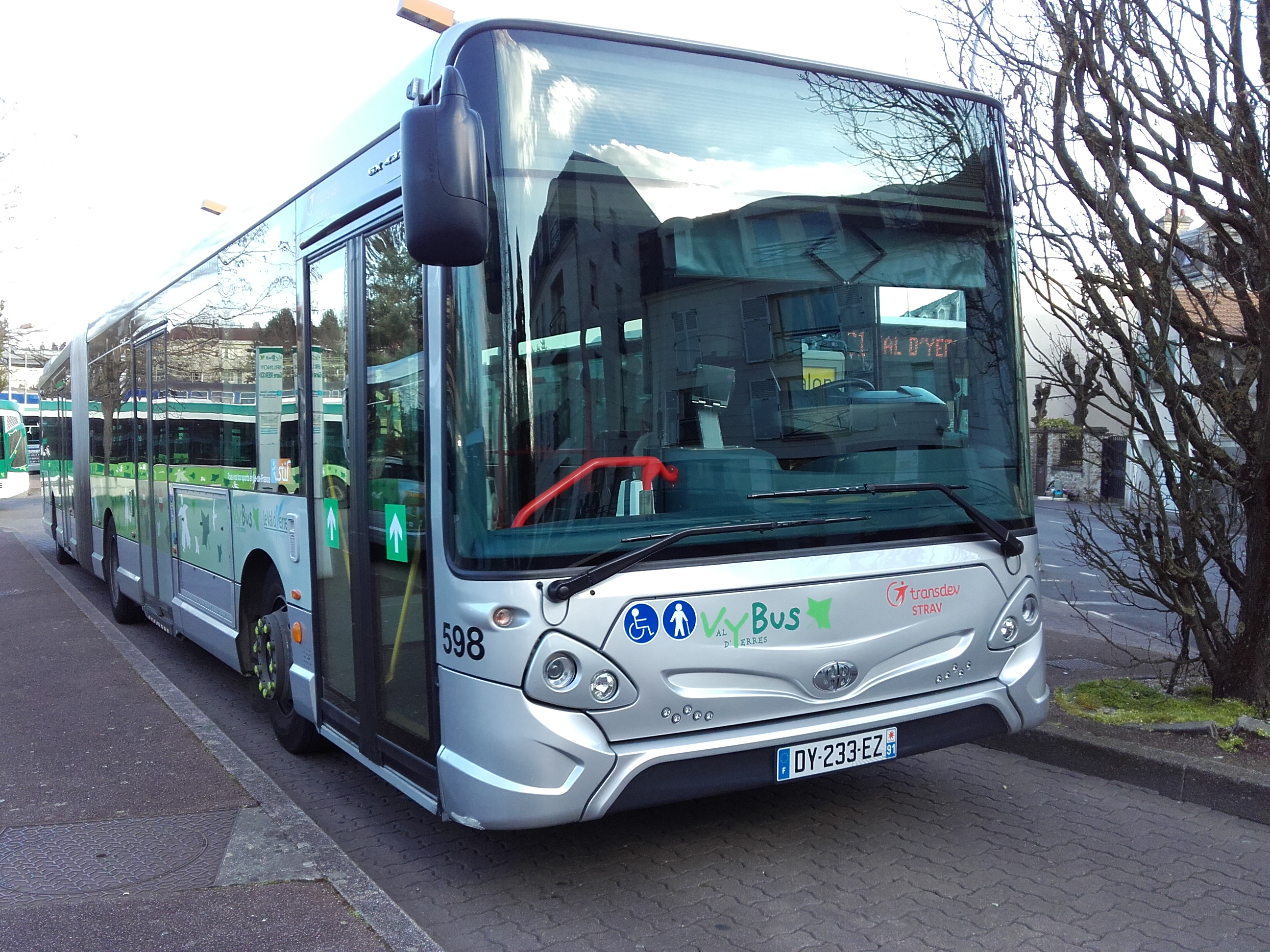 Heuliez GX 437 n°598 en livrée Val d'Yerres en gare routière de Brunoy.